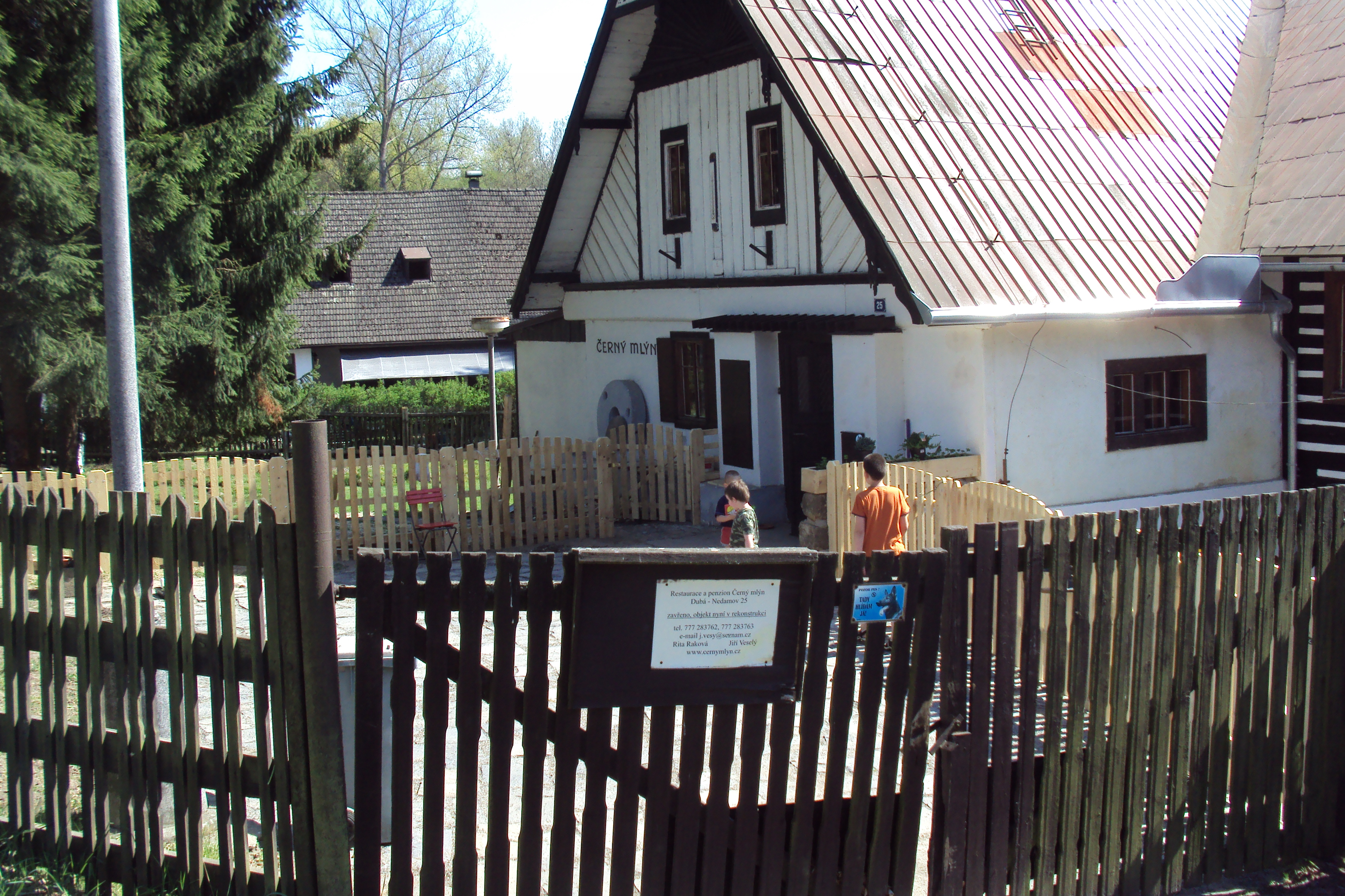 Stavení v Nedamově u Dubé, nyní i restaurace